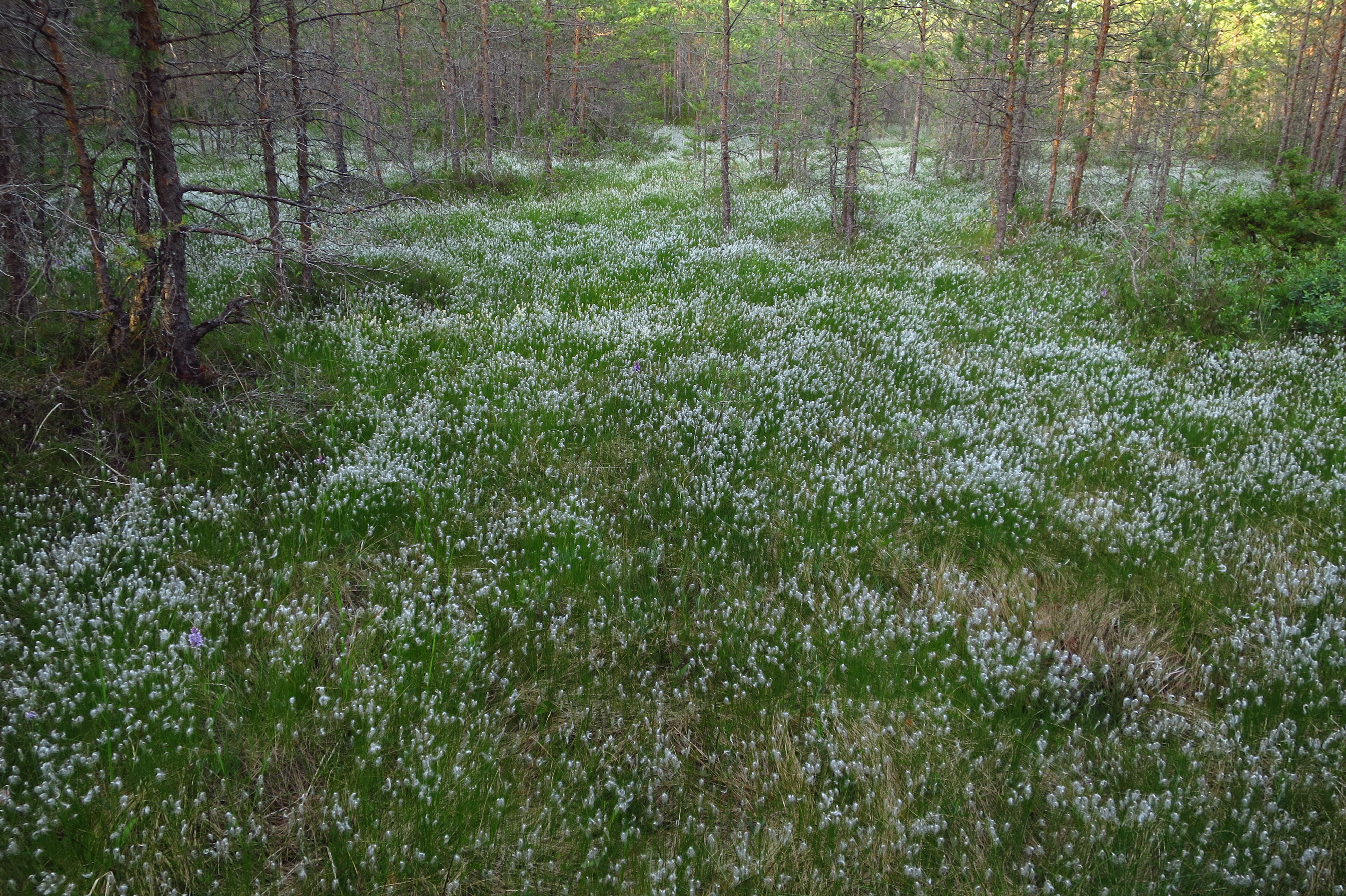 Alpi jänesvill Varudi rabas